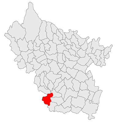 Categorie:Hărţi ale judeţului Buzău